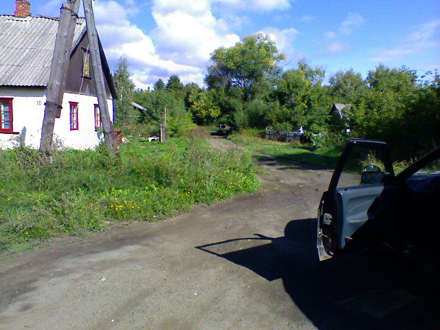 Фотография посёлка